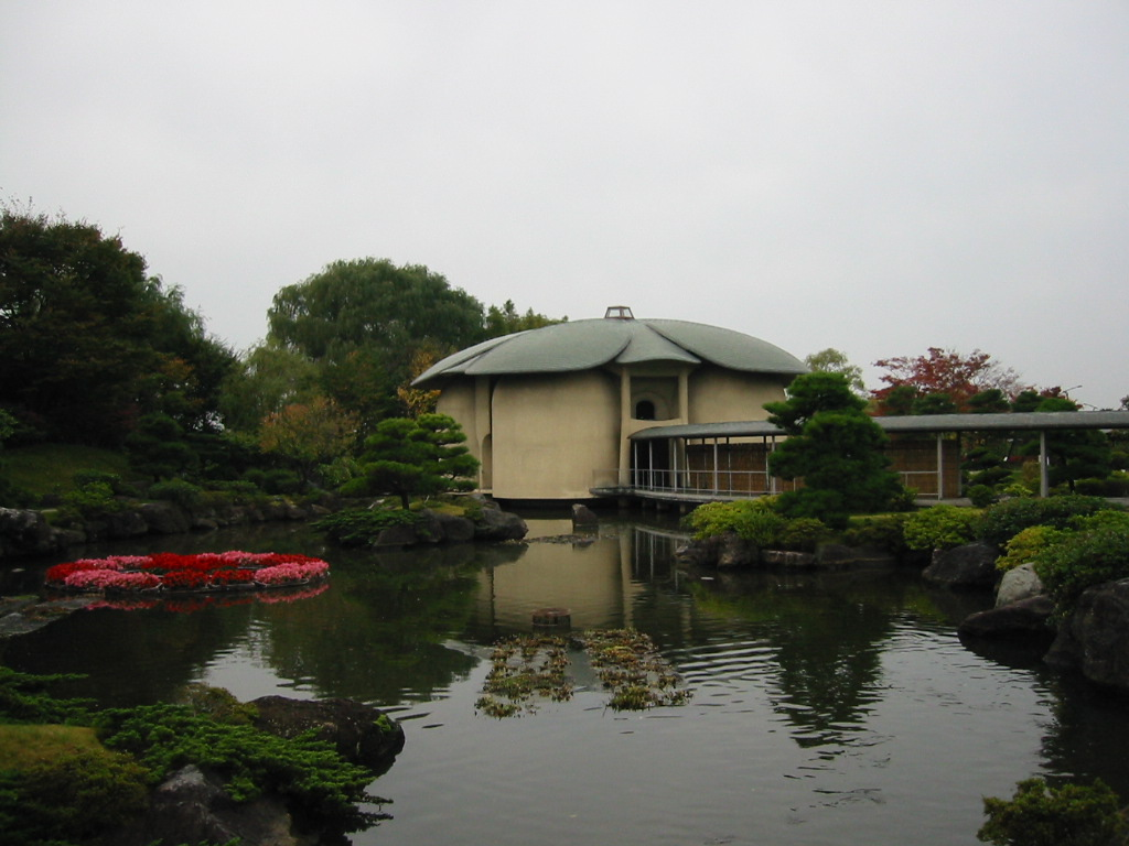 天寿園 瞑想館（新潟県新潟市）。